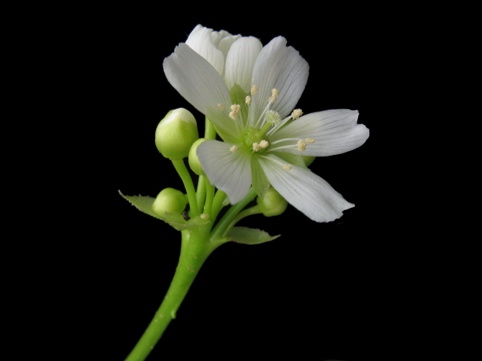 Blüte der Venusfliegenfalle